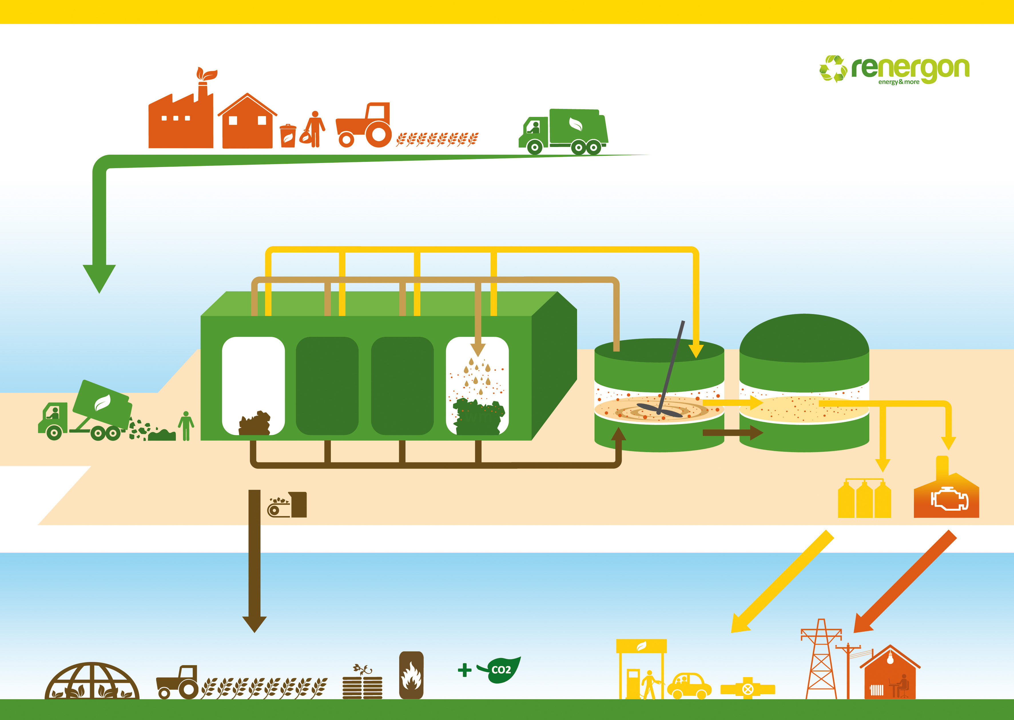 Biogasanlage Feststoffvergärung (Bioabfall, Grünschnitt, Festmist). Solid-state / dry fermentation biogas AD plant SSAD (biowaste, greencut, farm manure)